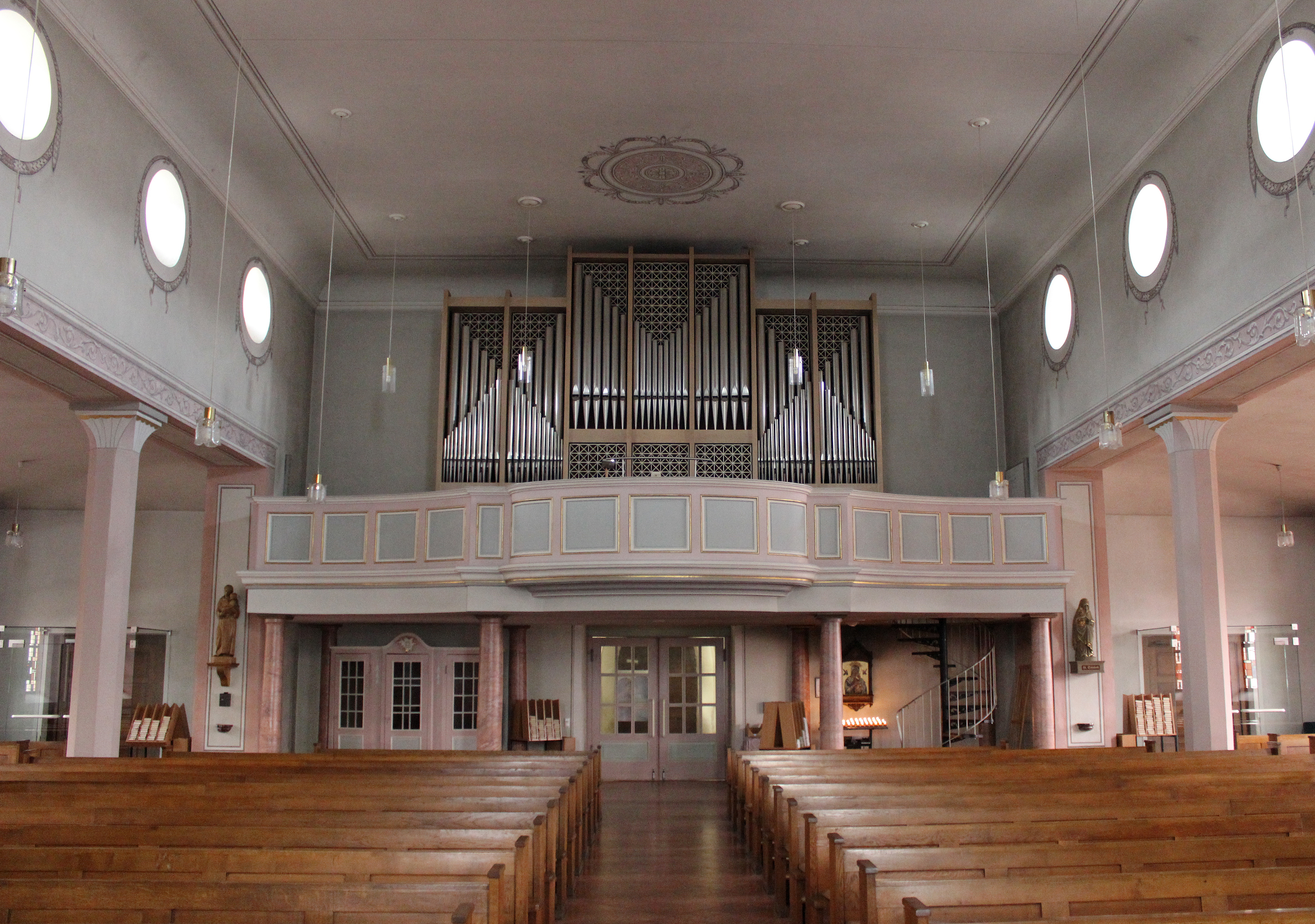 Blick ins Innere der katholischen Pfarrkirche St. Mauritius (erbaut 1829-1831) in Alsweiler, einem Ortsteil der Gemeinde Marpingen, Landkreis St. Wendel, Saarland